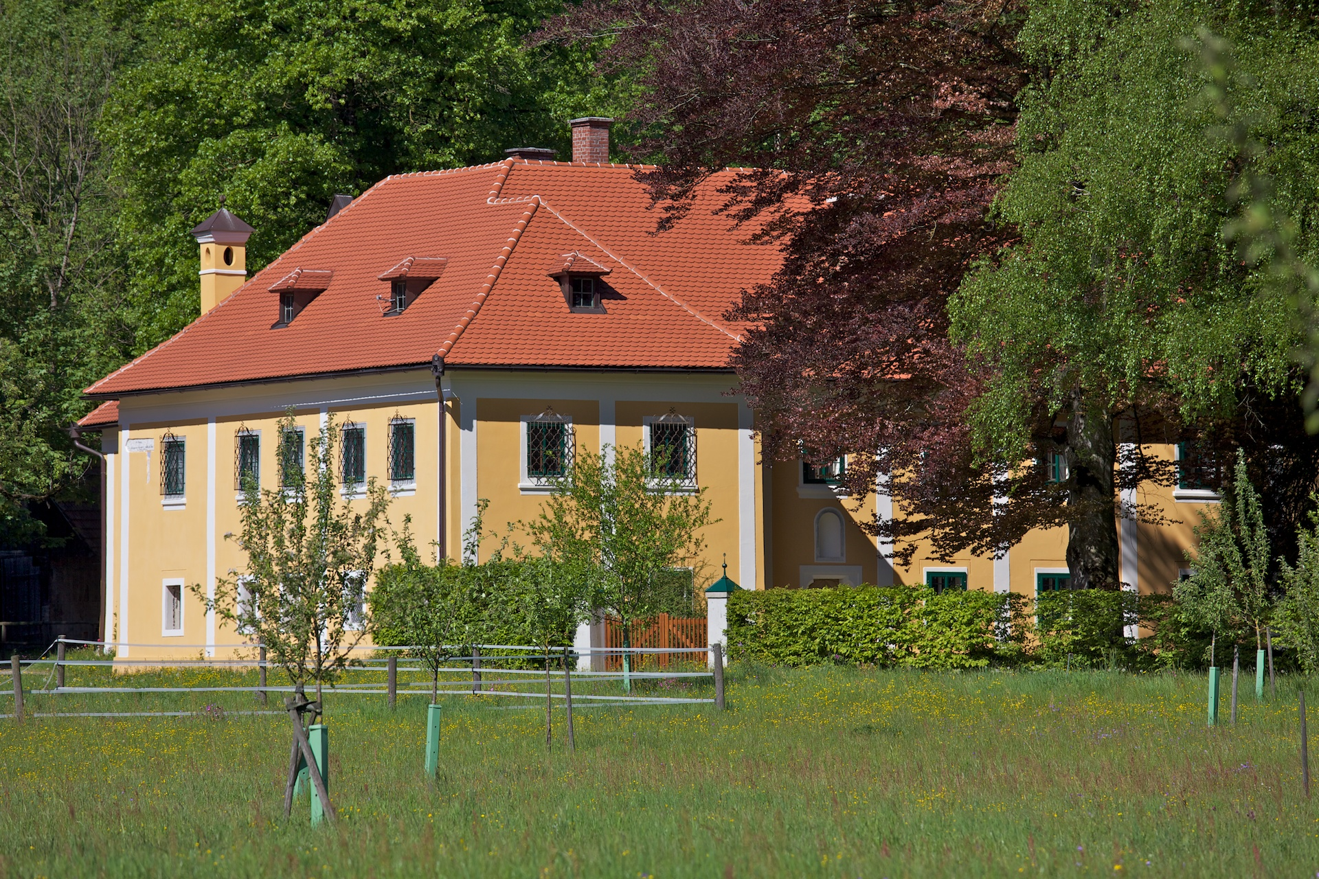 Herrenhaus der Pfusterschmiede